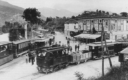 Tormini, 1912